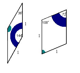 Penrose-féle dárda-sárkány csempék